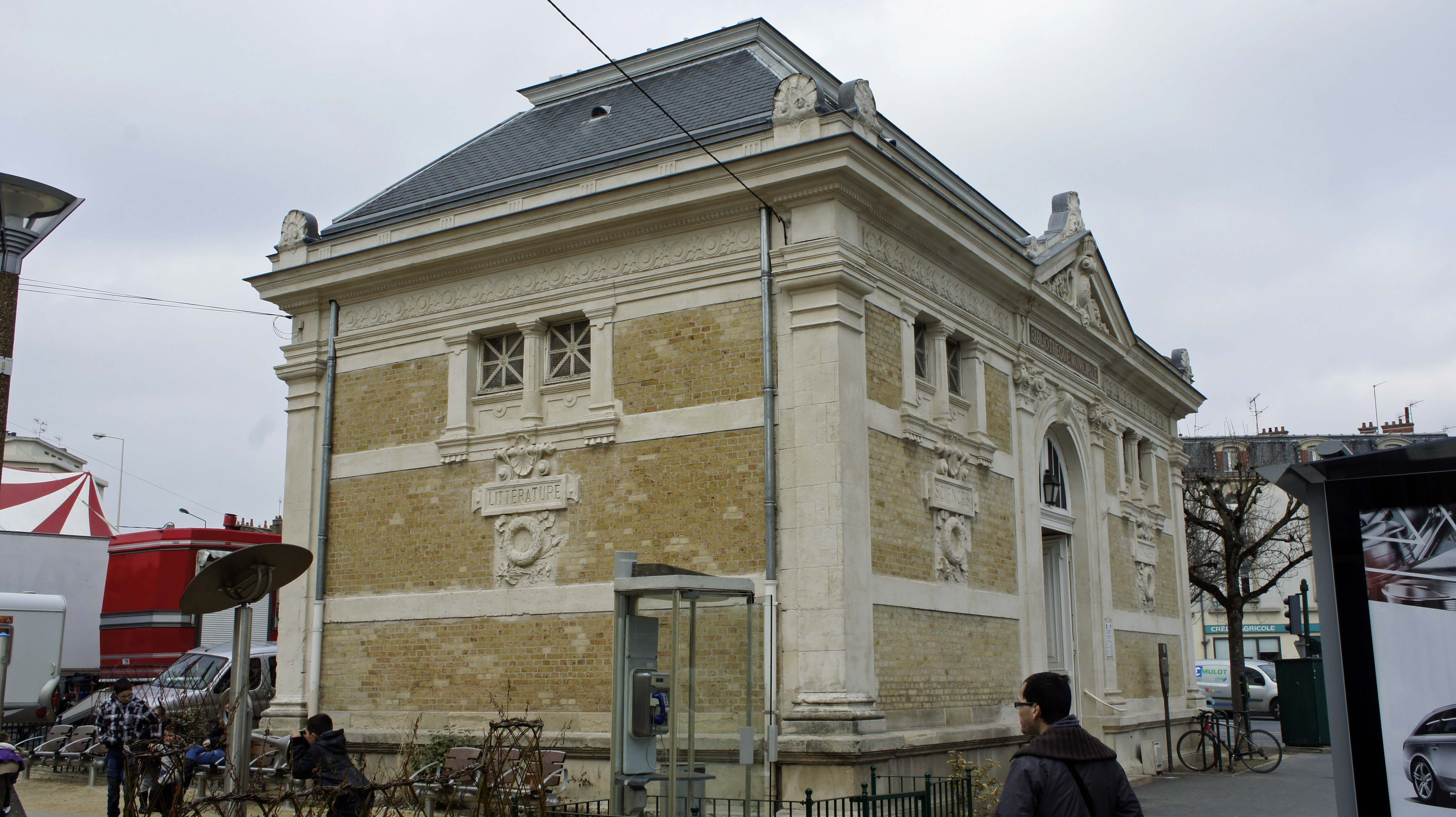 Bibliothèque_Holden construite par Jonathan Holden